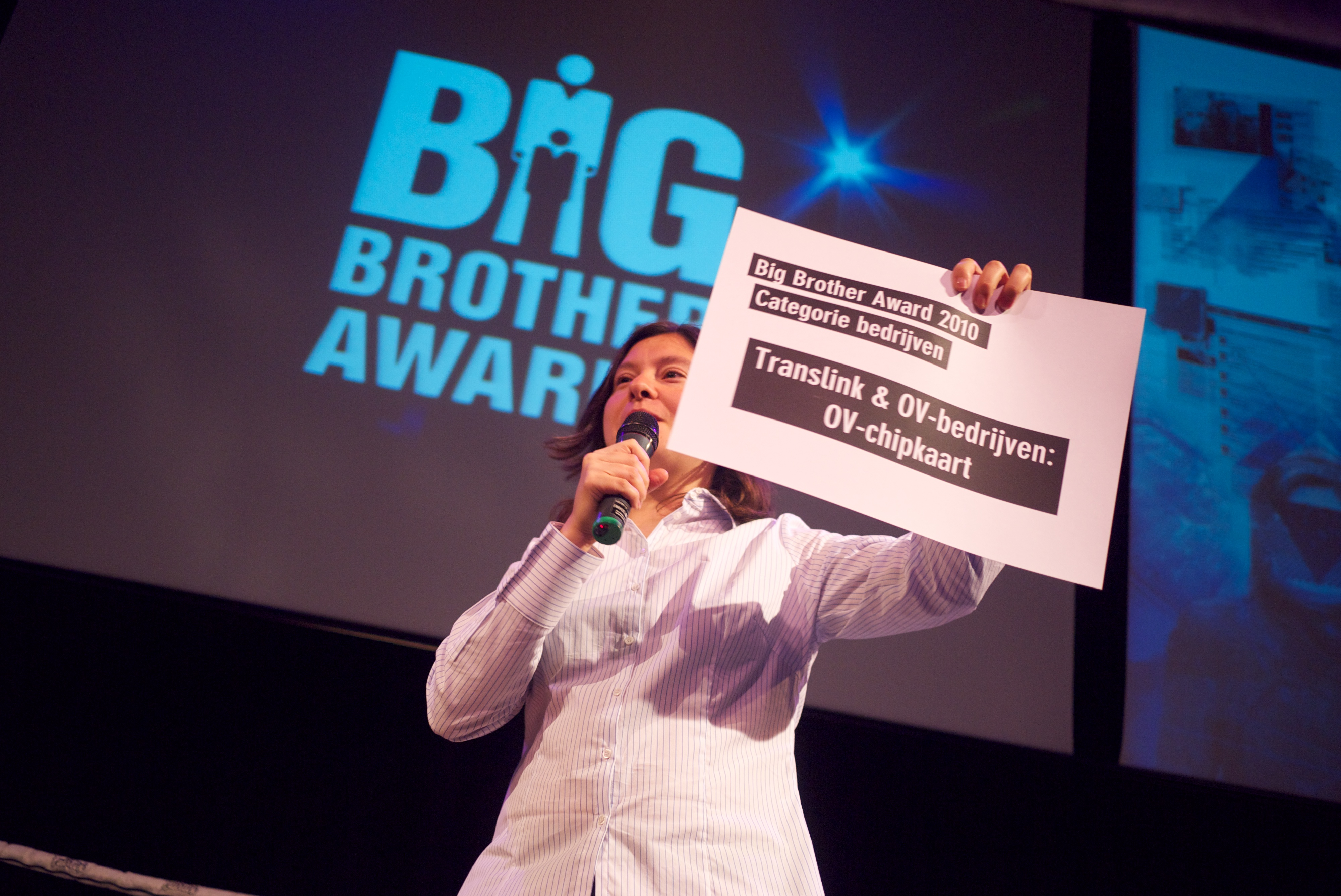 Melanie Rieback maakt de Big Brother Award 2010 in de categorie bedrijven bekend: Trans Link Systems